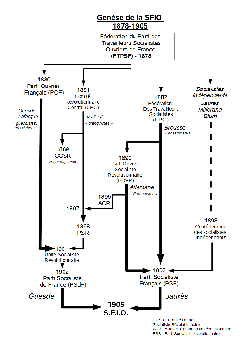 Schéma synthétique présentant les courants, les acteurs et les dénominations données aux mouvements à l'origine de la SFIO (1878-1905)